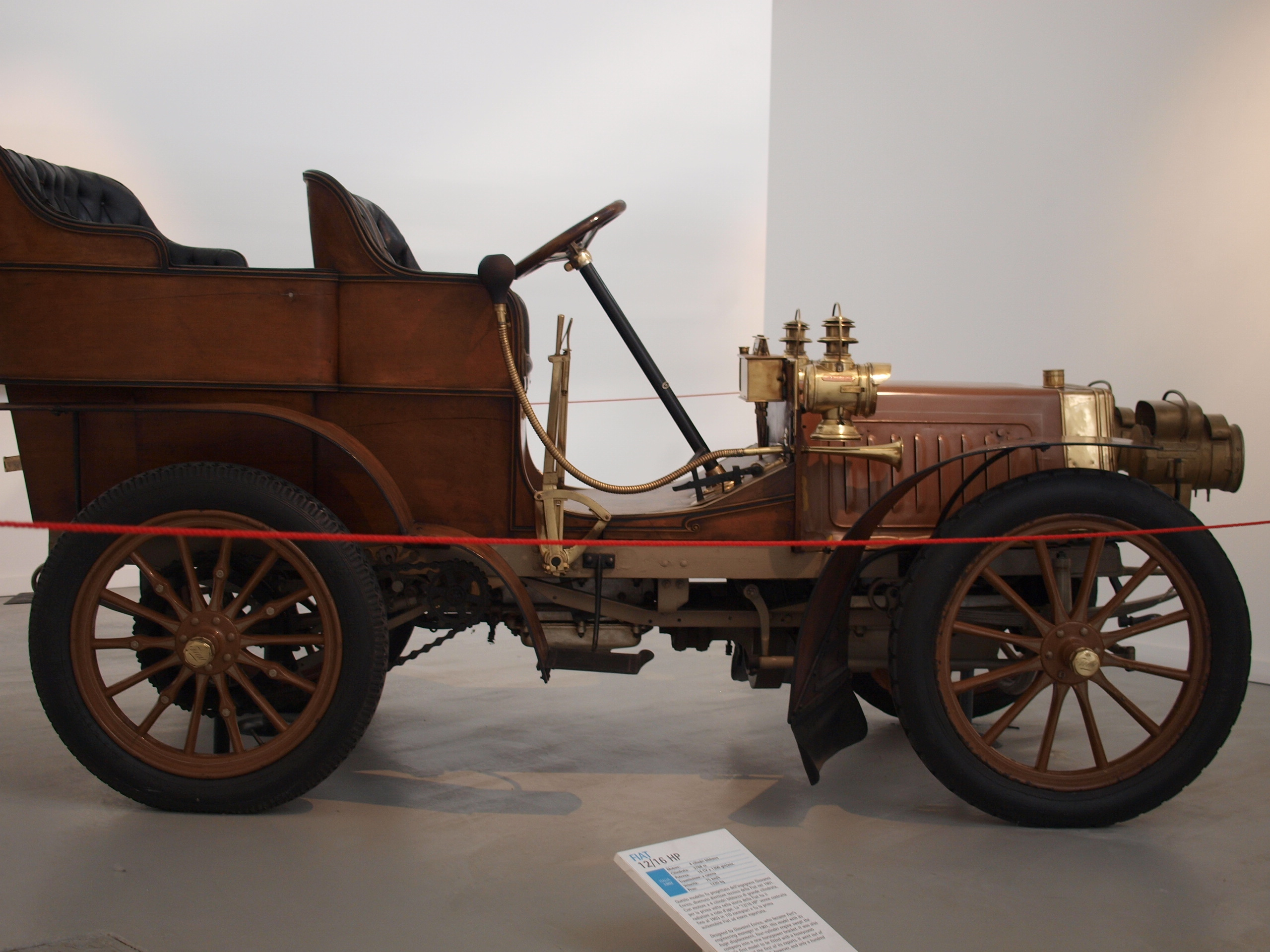 Fiat 12/16 HP del 1901